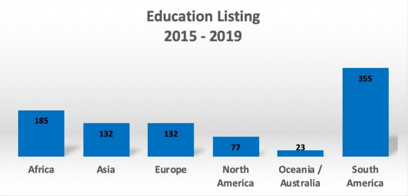 Estadísticas recientes del Programa de Educación para la Paz a nivel mundial